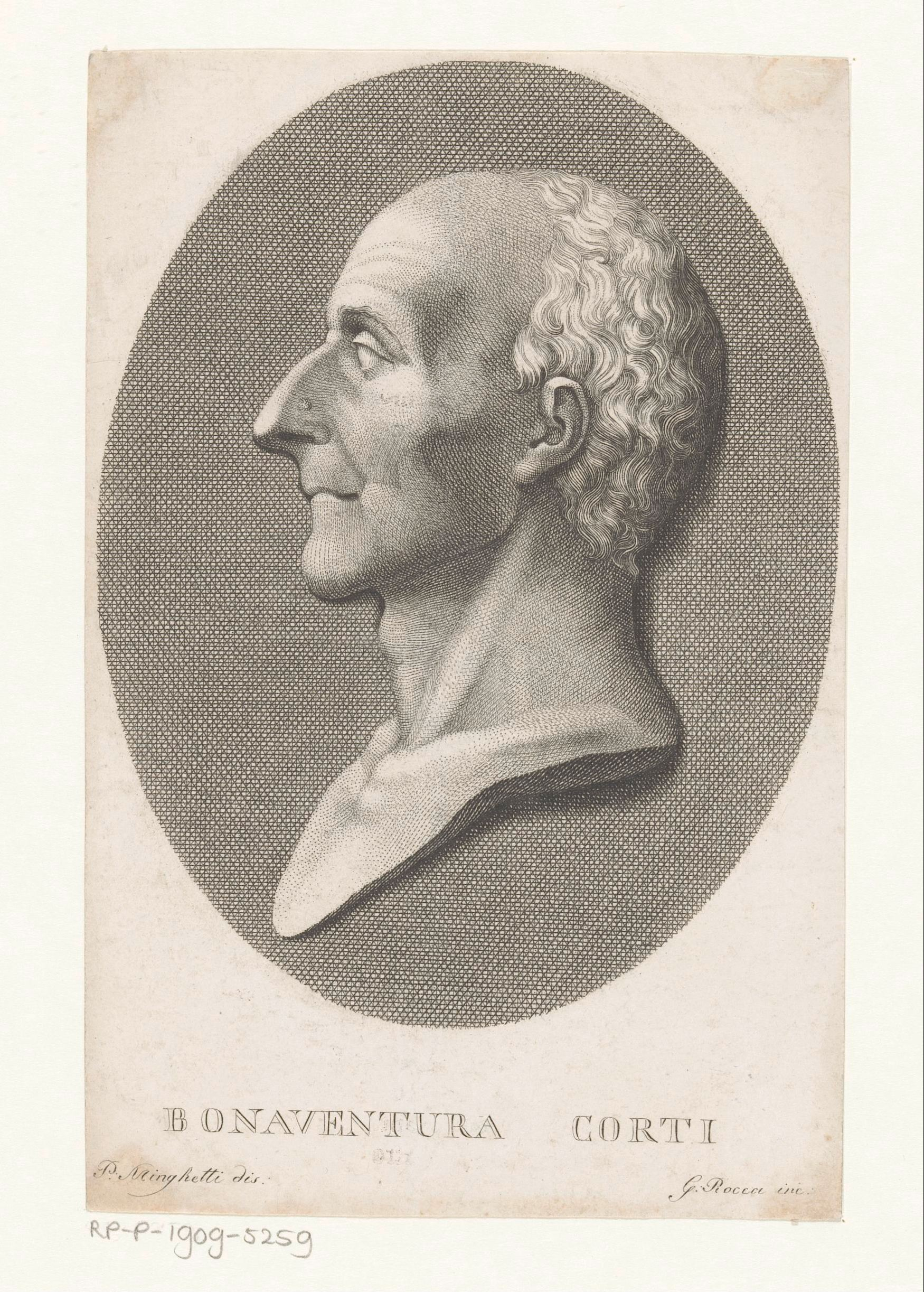 IdentificatieTitel(s): Portret van botanicus Bonaventura CortiObjecttype: prent Objectnummer: RP-P-1909-5259Opschriften / Merken: verzamelaarsmerk, verso, gestempeld: Lugt 2228VervaardigingVervaardiger: prentmaker: Giovanni Rocca (vermeld op object)naar tekening van: Prospero Minghetti (vermeld op object)Plaats vervaardiging: ItaliëDatering: 1798 - 1858Fysieke kenmerken: gravure en etsMateriaal: papier Techniek: graveren (drukprocedé) / etsenAfmetingen: blad: h 175 mm (Binnen plaatrand afgesneden.) × b 114 mm (Binnen plaatrand afgesneden.)OnderwerpWat: historical personsscience and technology (+ portrait of scholar, scientist)Wie: Bonaventura CortiVerwerving en rechtenVerwerving: aankoop 1905Copyright: Publiek domein